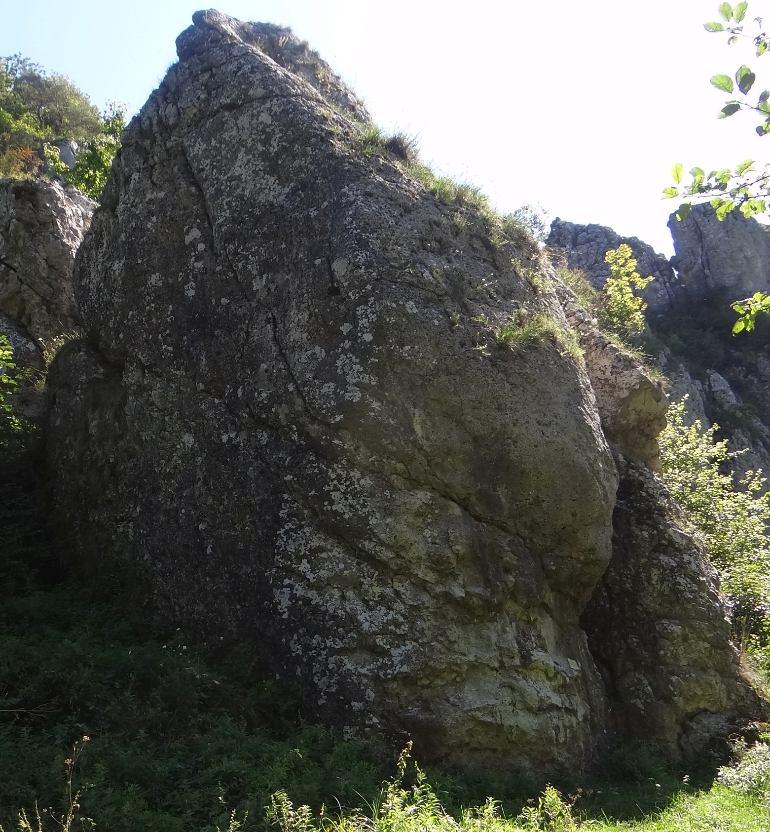 Poprzeczna Grzęda w Dolinie Bolechowickiej